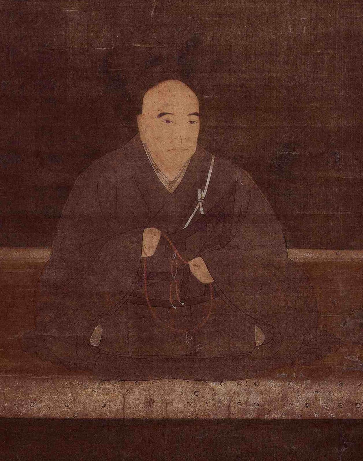 Image:Jitunyo.jpgの拡大画像